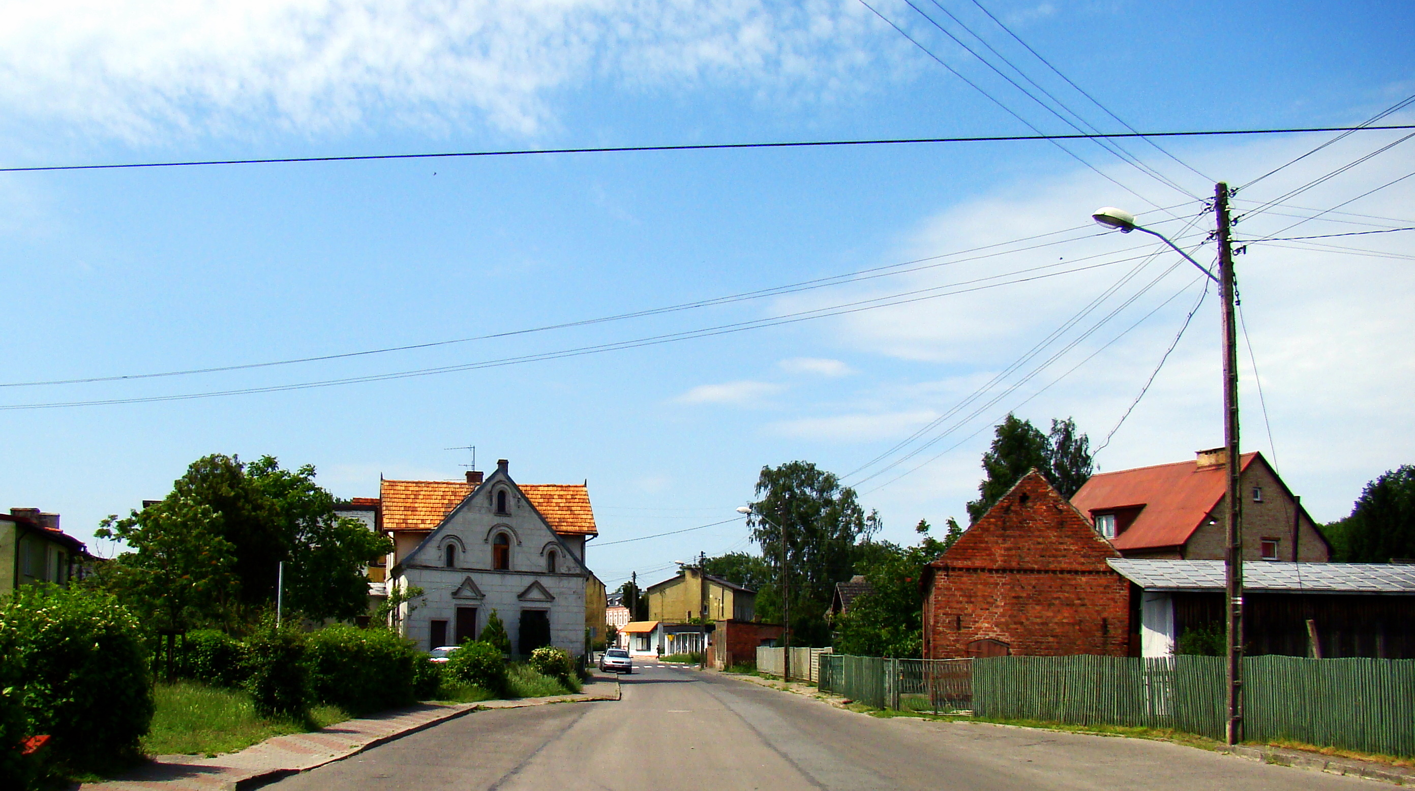 Trzebież, ul. Portowa, (Gmina Police, Powiat policki, Województwo zachodniopomorskie), Polska